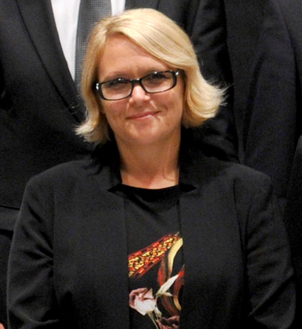 Anja Kopač Mrak.